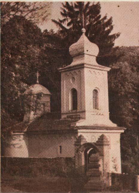 Мильков монастырь в 1920-е годы